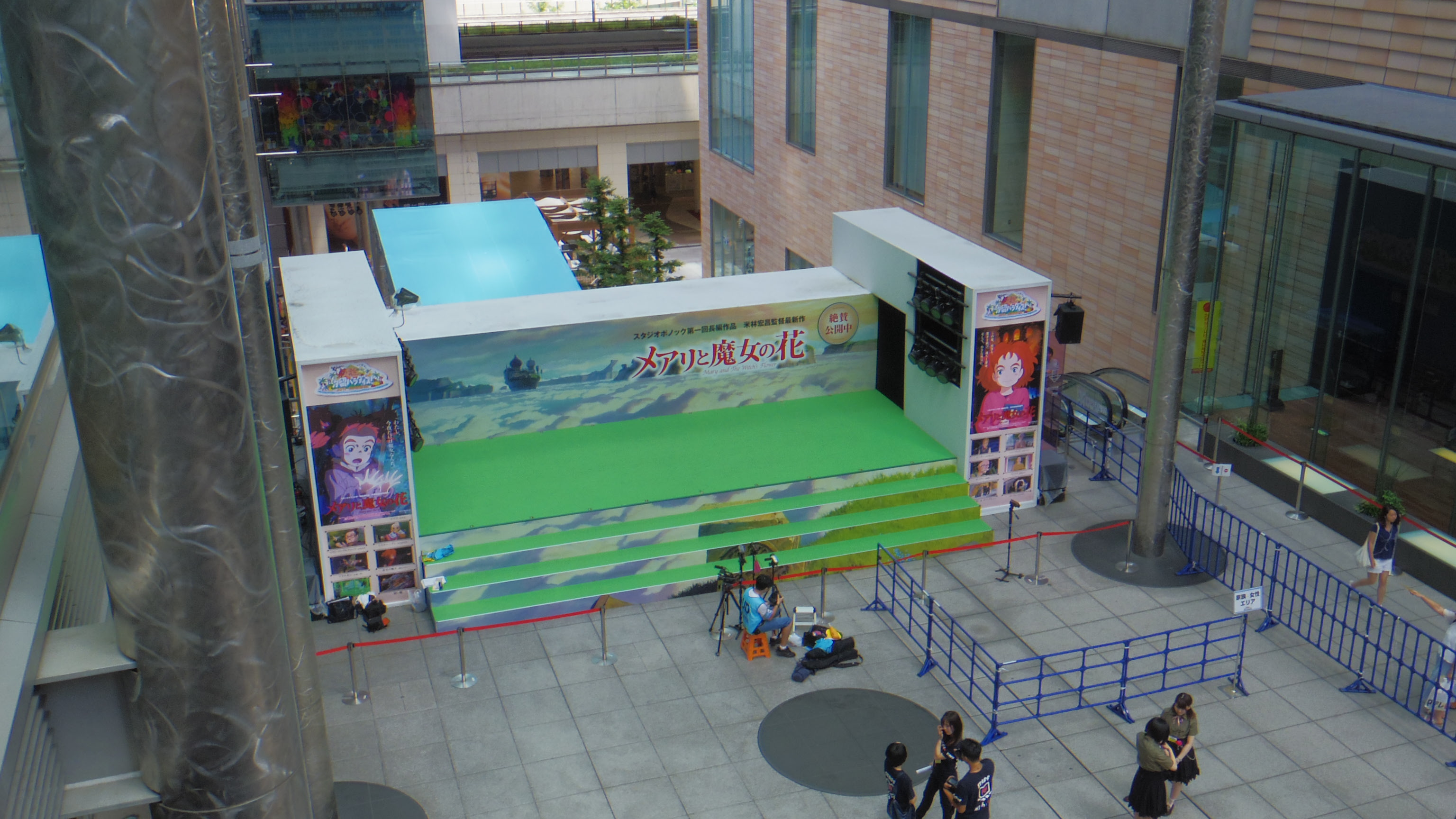 日本テレビの夏イベント「超☆汐留パラダイス!2017SUMMER」より、「メアリと魔女の花」ステージ。 イベント最終日(2017年8月27日)、日本テレビタワー2階デッキより撮影。